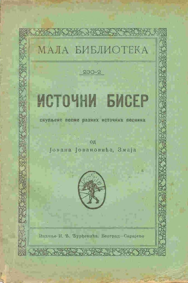 Насловна страна књиге „“ИСТОЧНИ БИСЕР“, друго издање, Сарајево 1920.